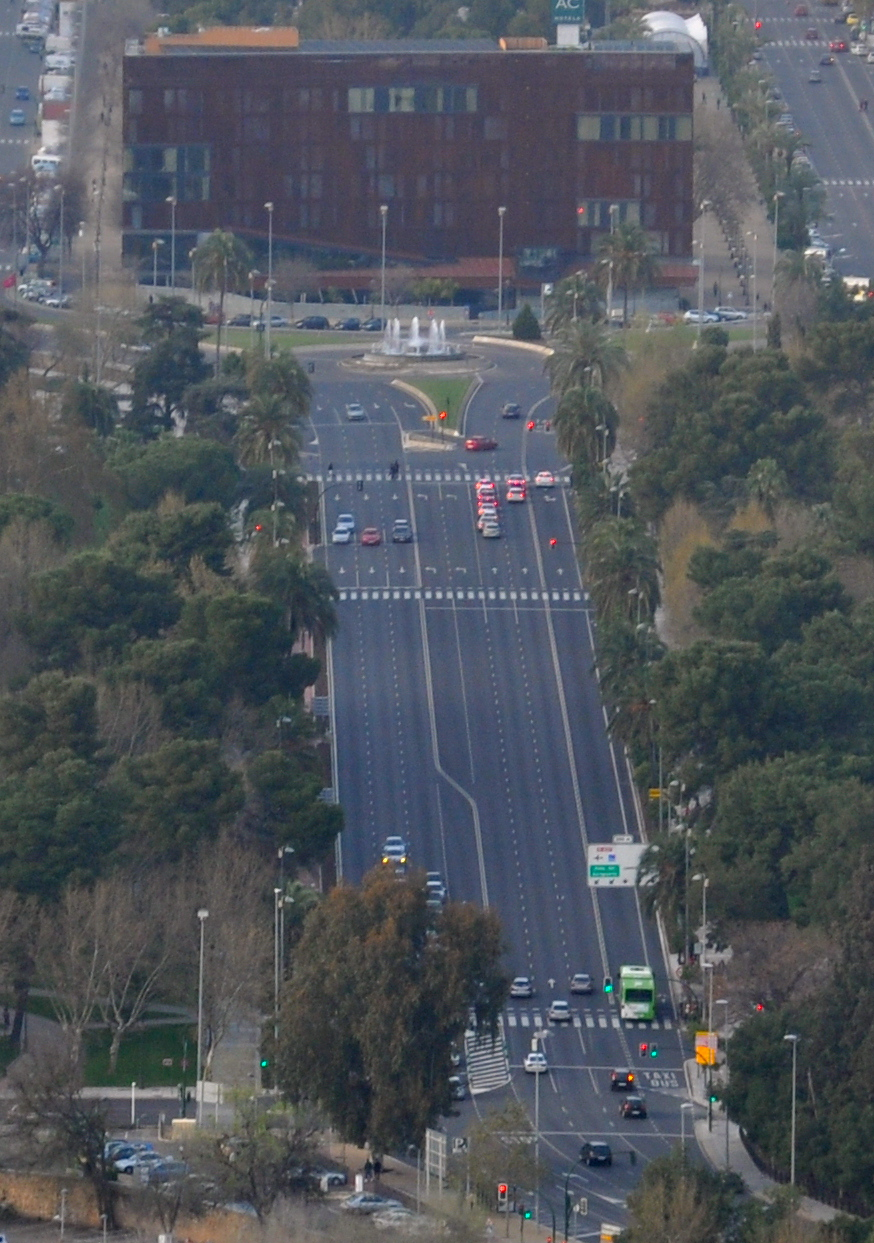 Vista aérea de Córdoba (España). En el centro puede verse la Avenida del Conde de Vallellano que se divide en dos, Avenida de la República Argentina y Avenida de la Victoria.